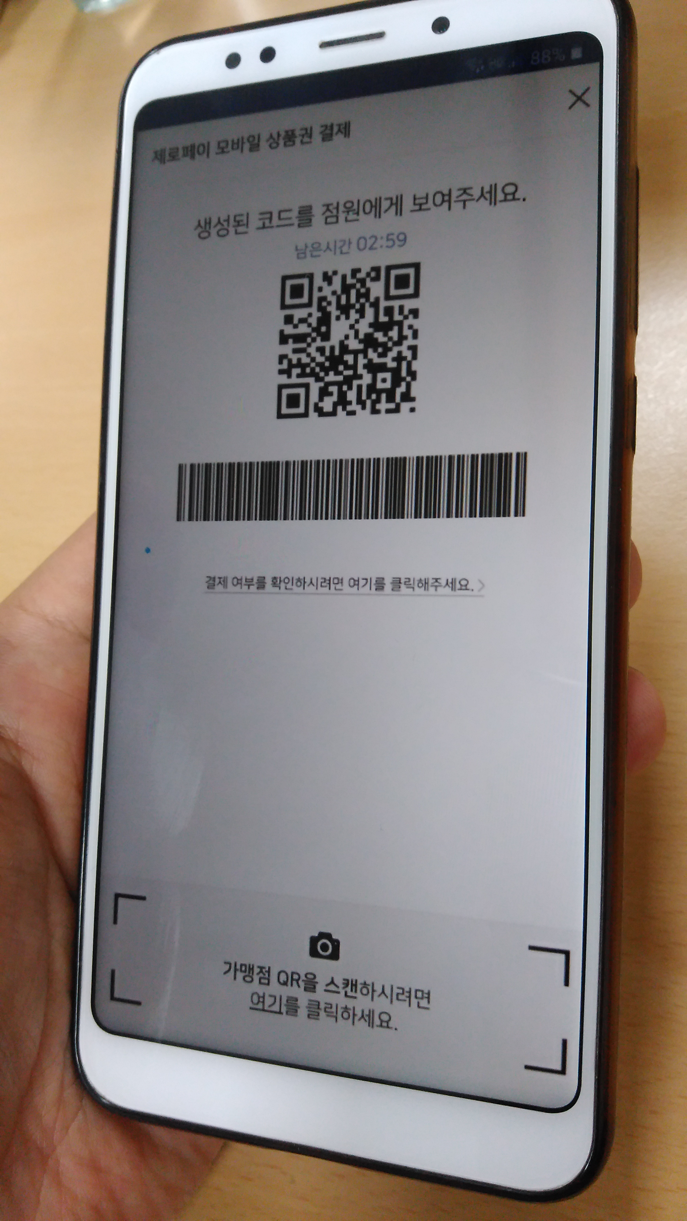 제로페이 결제시 생성되는 화면